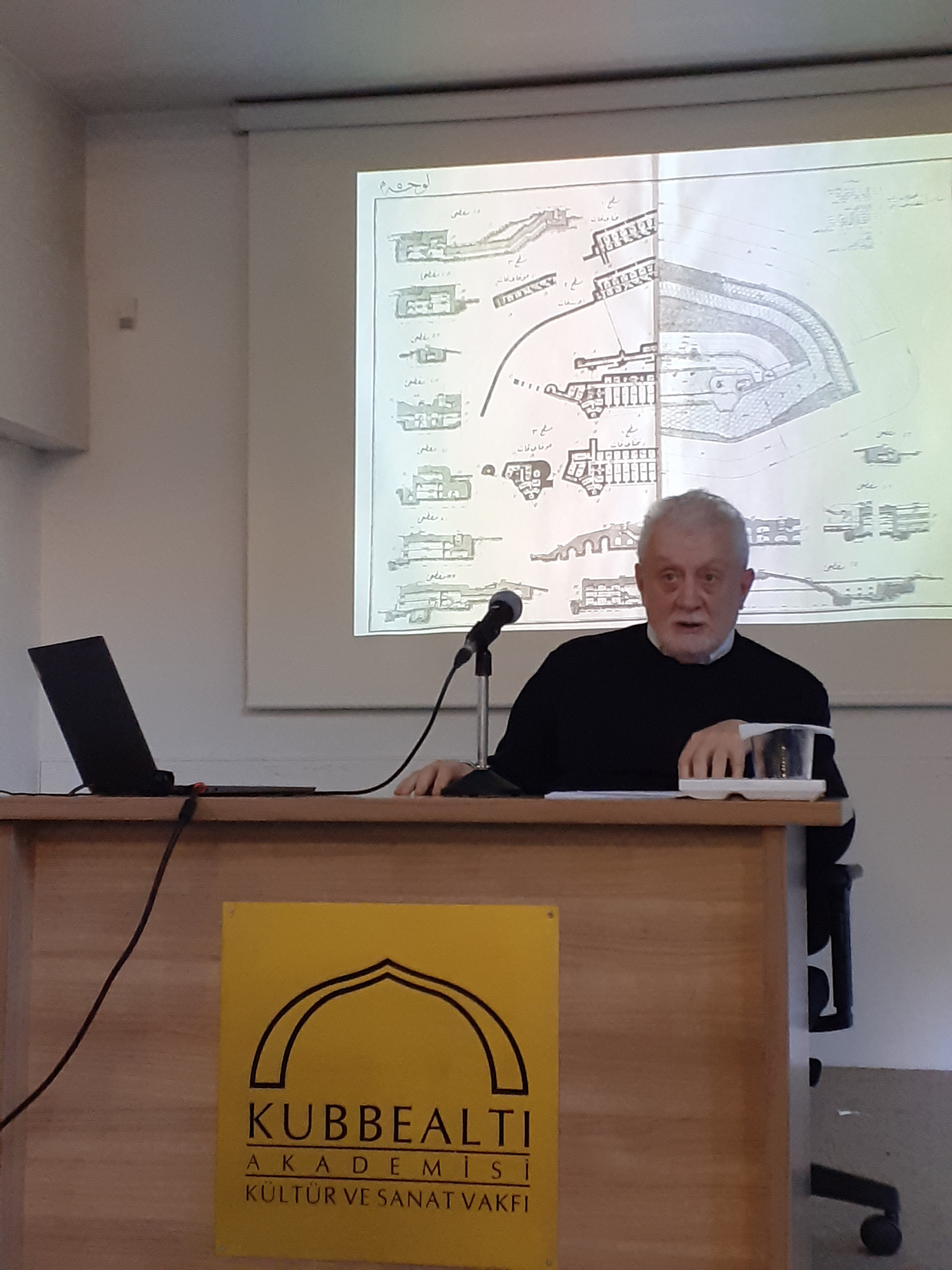 Uğur Tanyeli Kubbealtı Konuşmaları'nda.